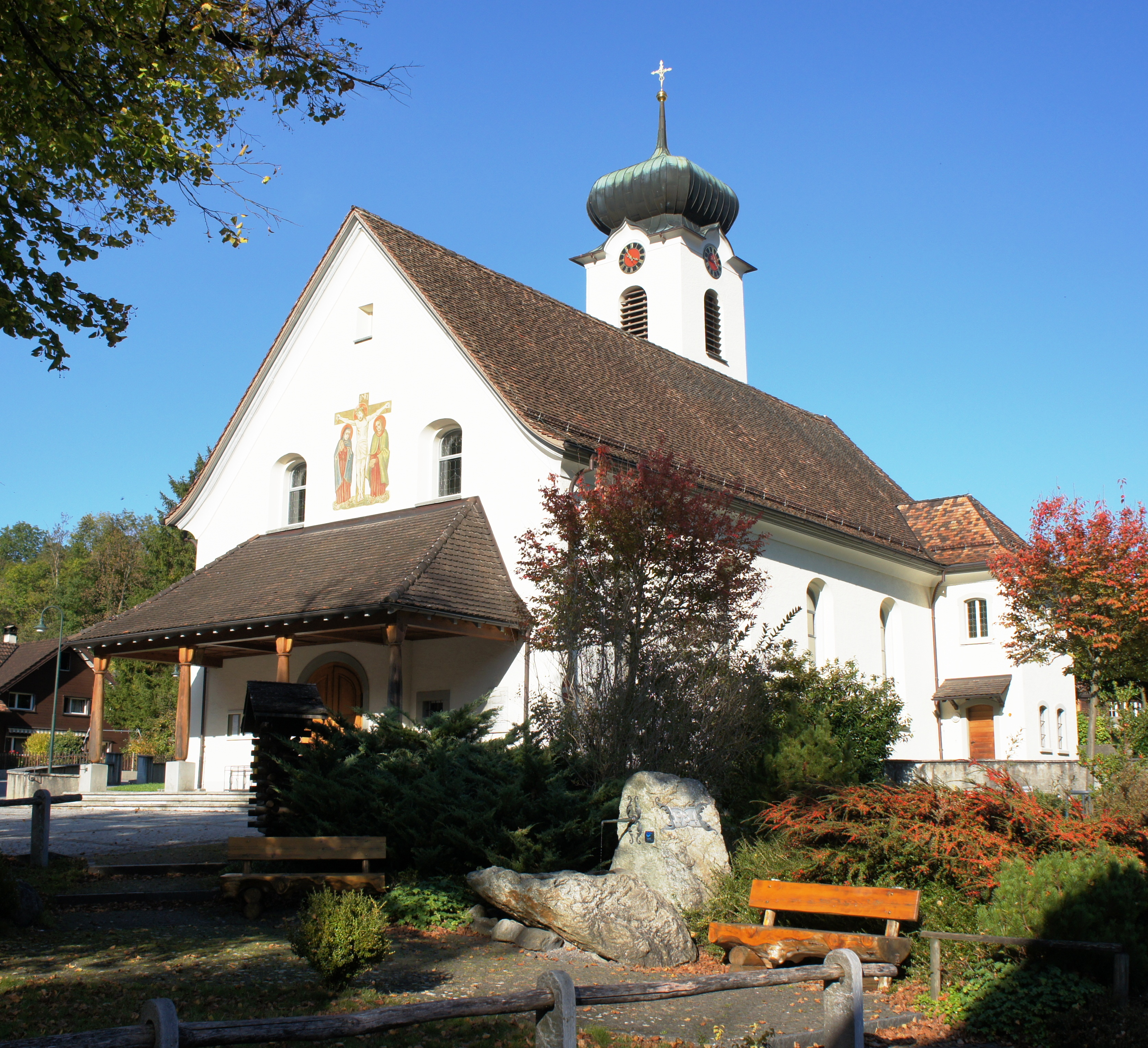 Süd- und Westfassade der Pfarrkirche Kobelwald. Links der überdachte Haupteingang. Rechts über dem Kirchendach erkennt man den Turm mit Zwiebeldach und Kreuz auf der Spitze. Die Turmuhr hat einen roten Grund, vergoldete Zeiger und römische Ziffern auf schwarzem Grund. Über dem Eingangsdach zwischen den zwei Emporen-Fenstern ist ein gemaltes Bild der Kreuzigungs-Gruppe. Vom gepflästerten Vorplatz führen drei Stufen zum Eingangsbereich, der mit vier auf Steinsockeln stehenden Holzsäulen markiert ist. Rechts an der Südostecke der Kirche ist die Sakristei angebaut. Im Vordergrund der Dorfpark mit Brunnen und Sitzbänken.